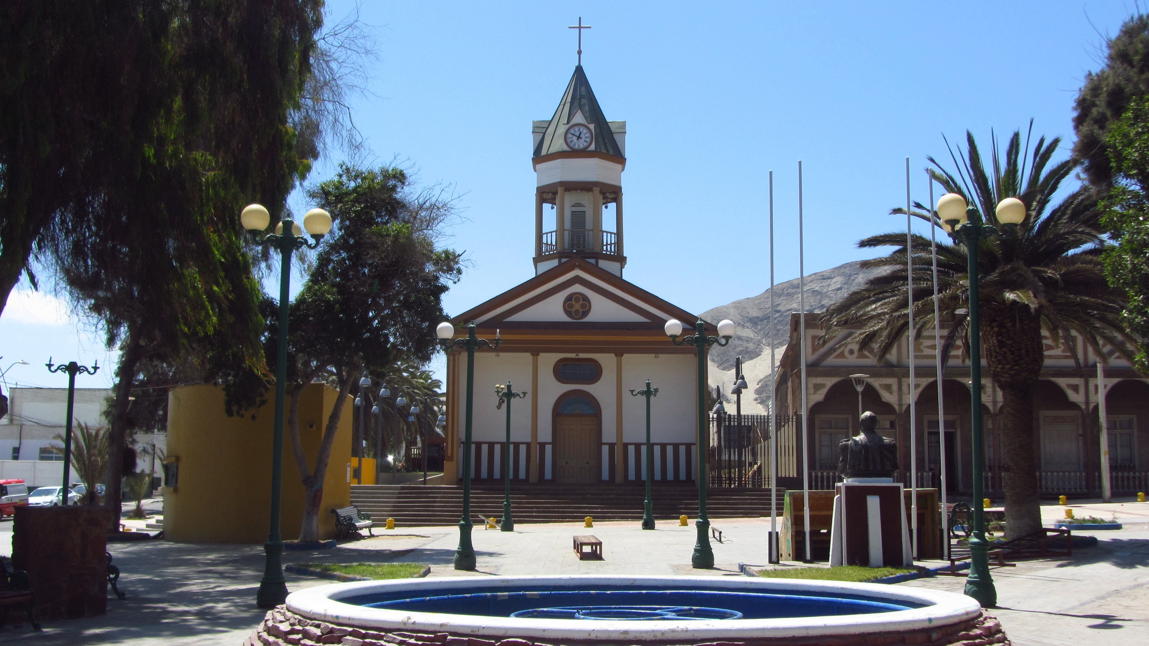 Plaza de Chañaral, Región de Atacama, Chile, Febrero de 2016